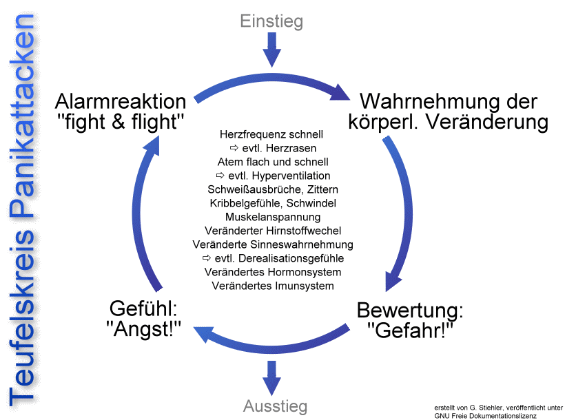 Grafik zum Thema Panikattacken.